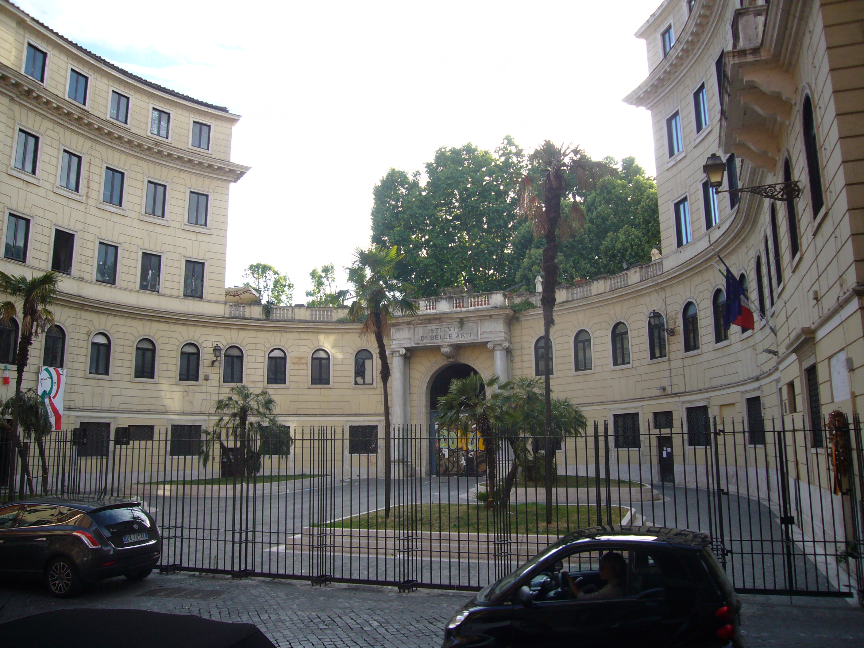 Roma, via di Ripetta, il "Ferro di cavallo", sede dell'Accademia di Belle Arti di Roma